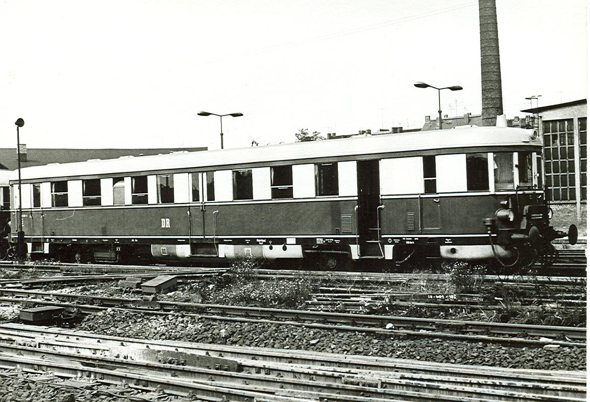 185.00(?) in Berlin aus dem fahrenden Zug fotografiert